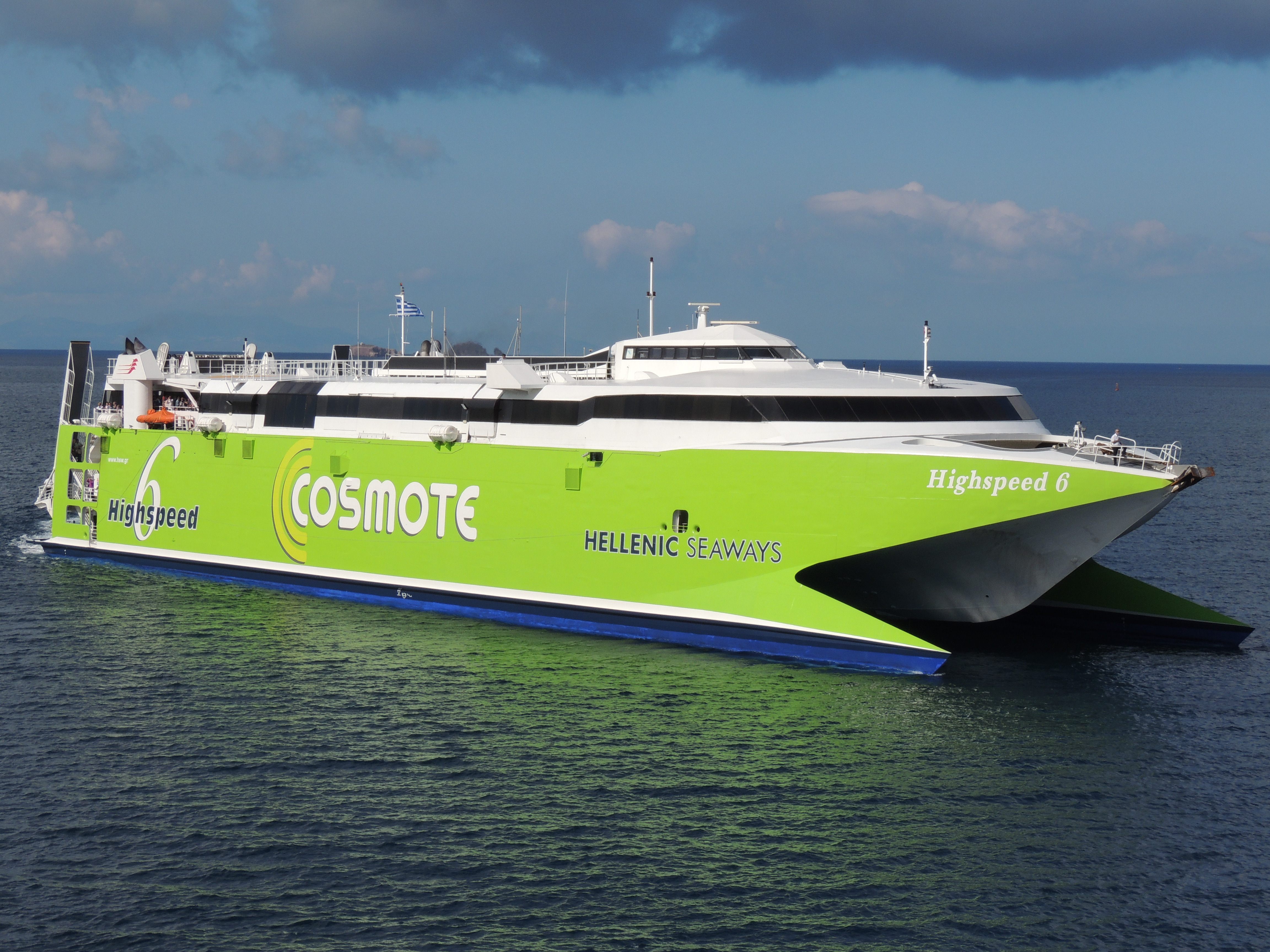 HIGHSPEED 6 (ex Milenium) betrieben von Hellenic Seaways im September 2015 im Hafen von Paros, Ägäis